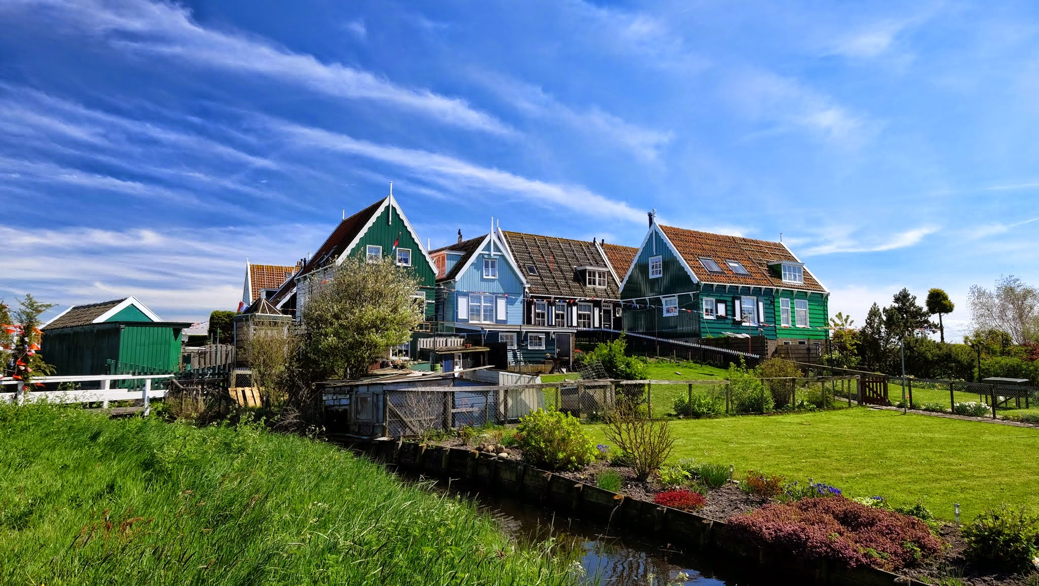 1156 Marken, Netherlands